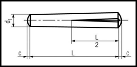 DIN 1472